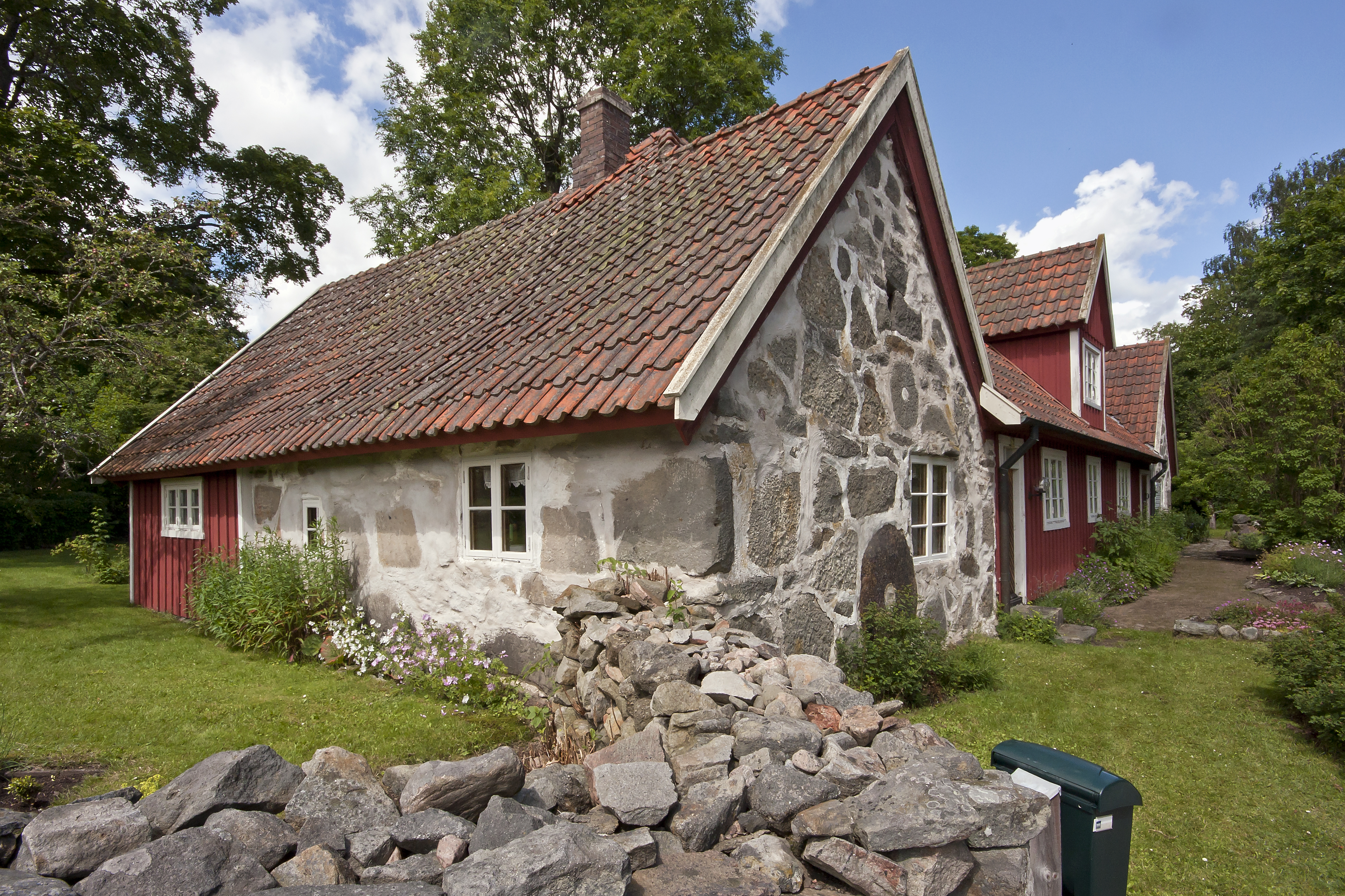 En privatbostad i Höör.